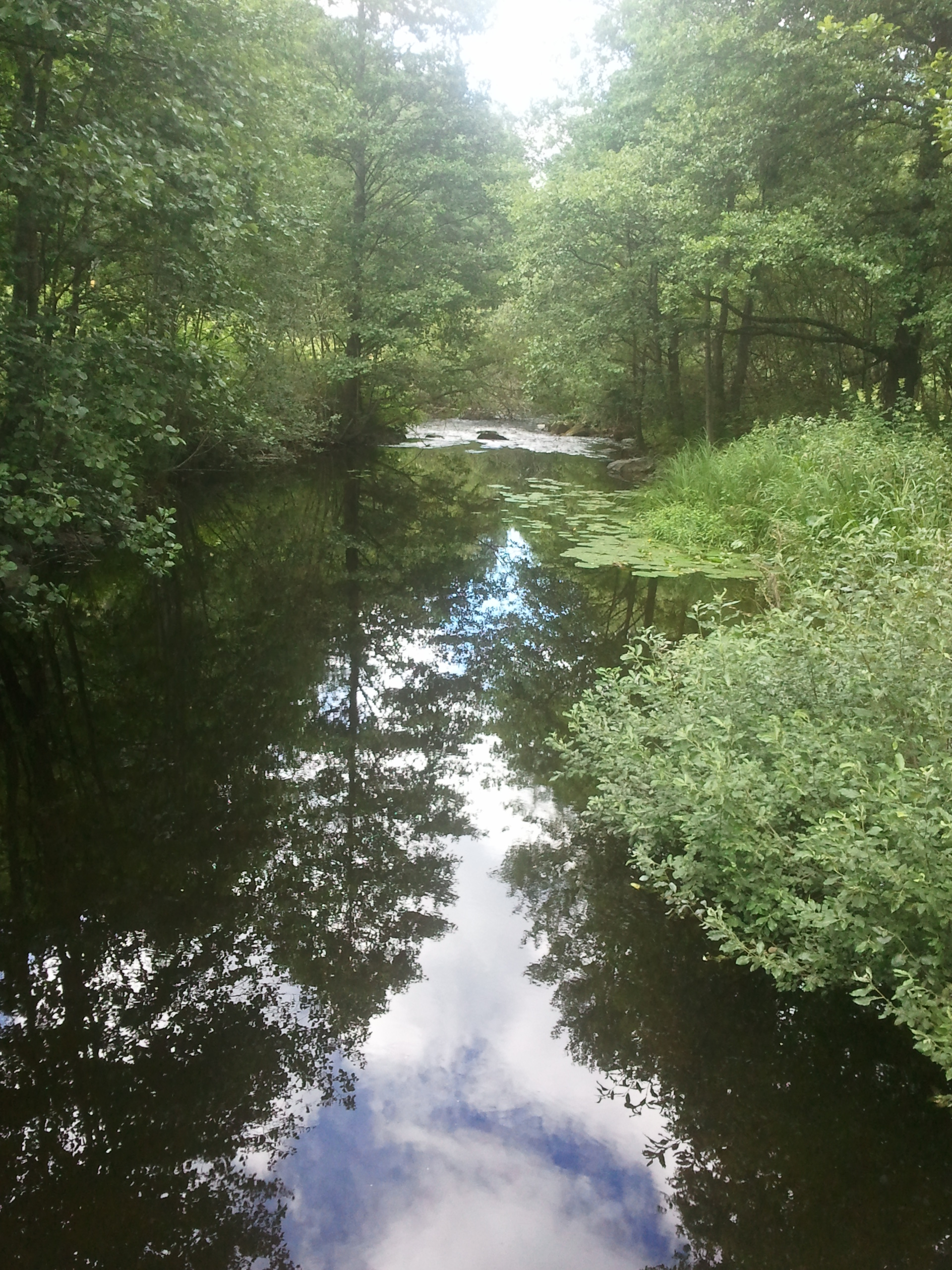 Gjersjøelva ved Hvitebjørn i Oppegård.